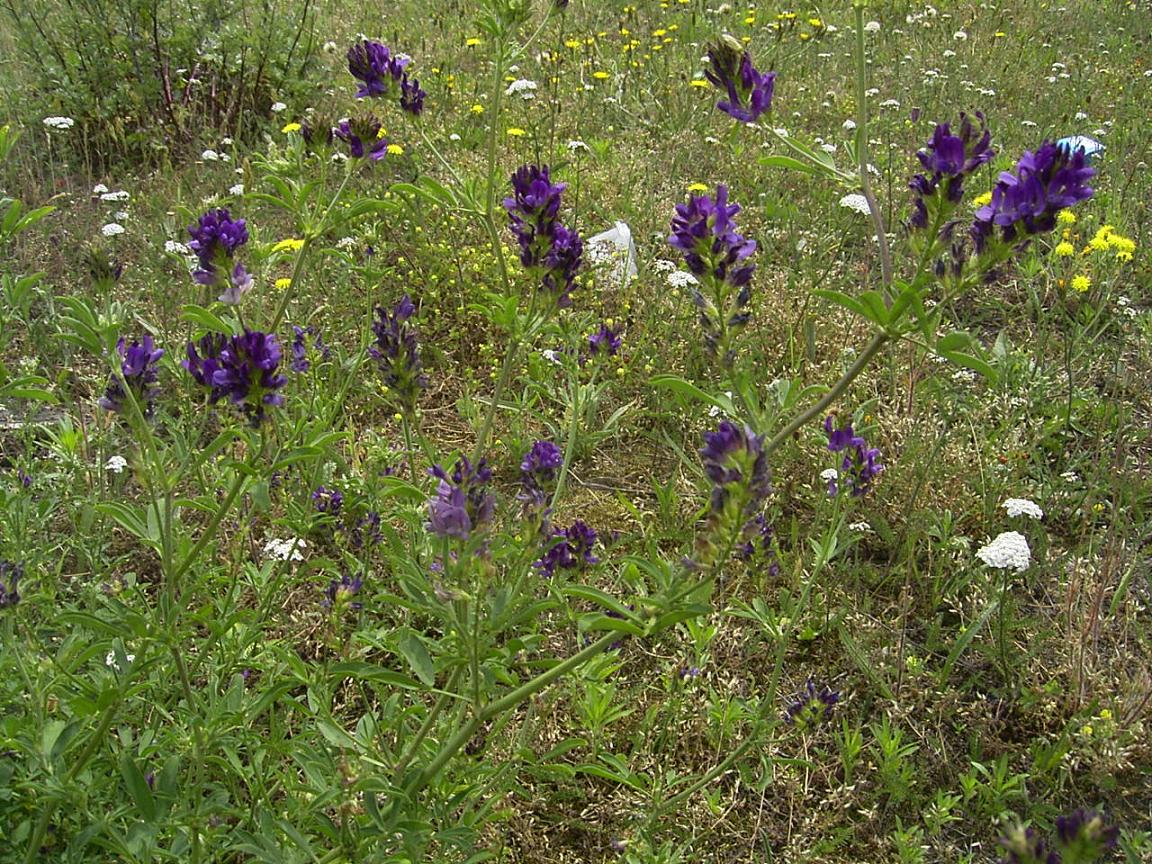 Gouda, bedrijventerrein Goudse Poort, juni 2004